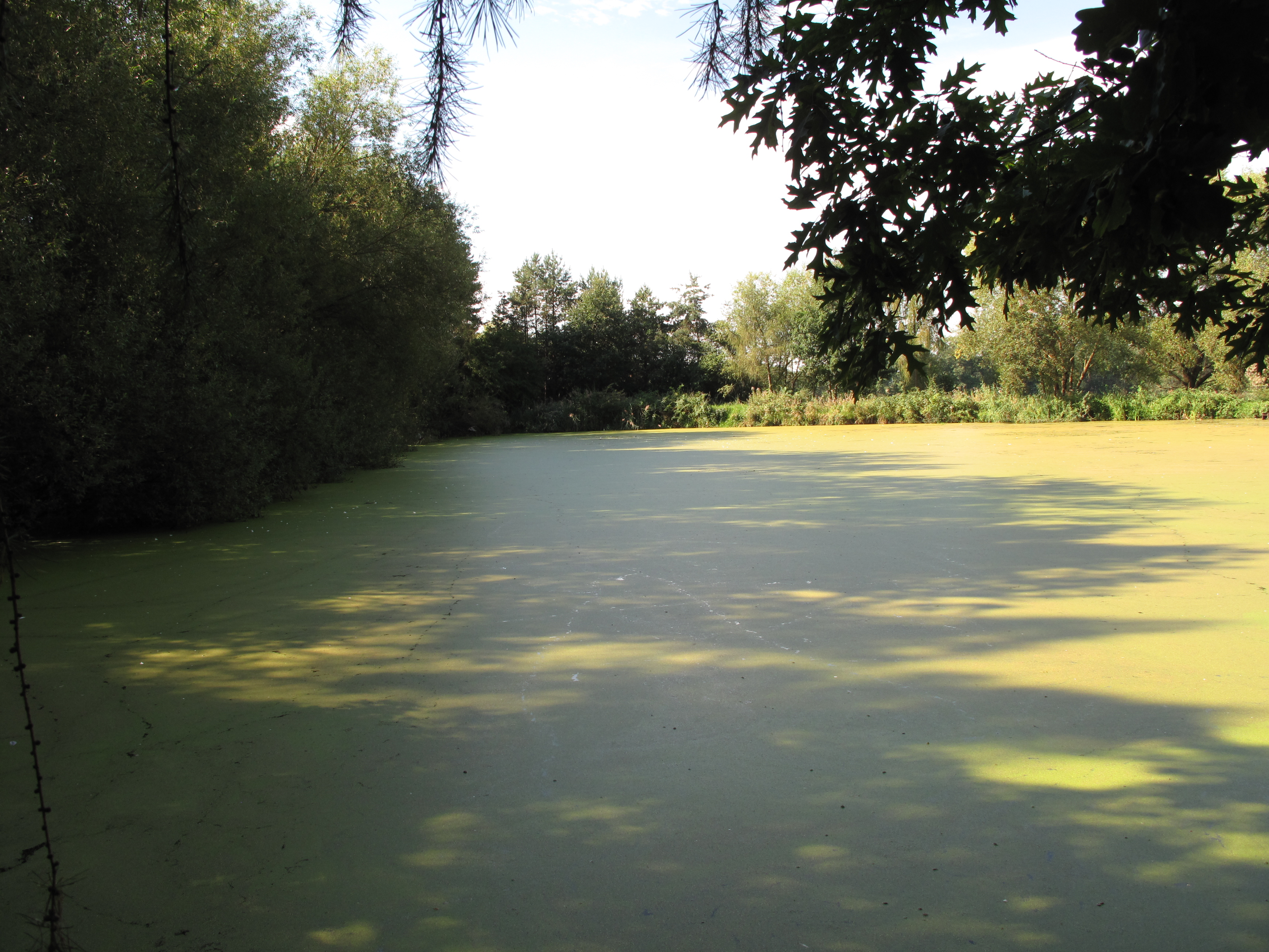 Podkovka. Okres Písek, Česká republika.